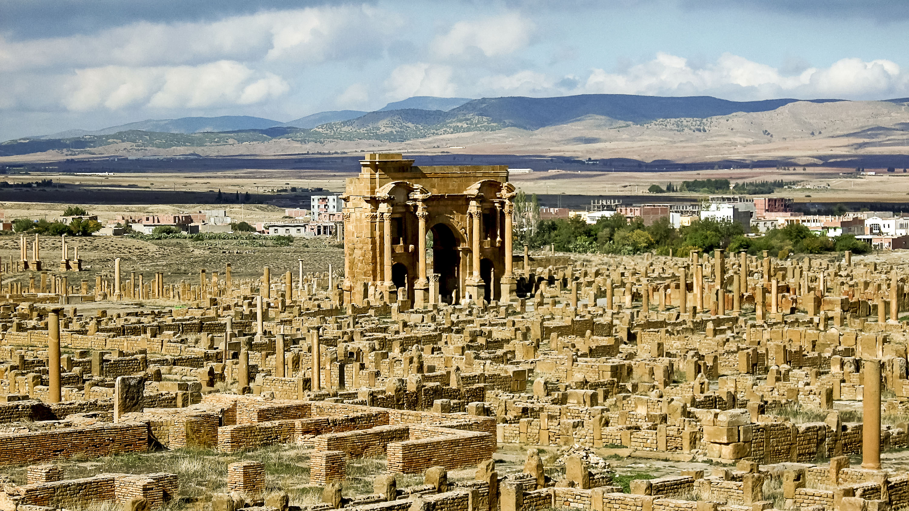 Timgad تيمقاد Timgad, wilaya de Batna تيمقاد، ولاية باتنة